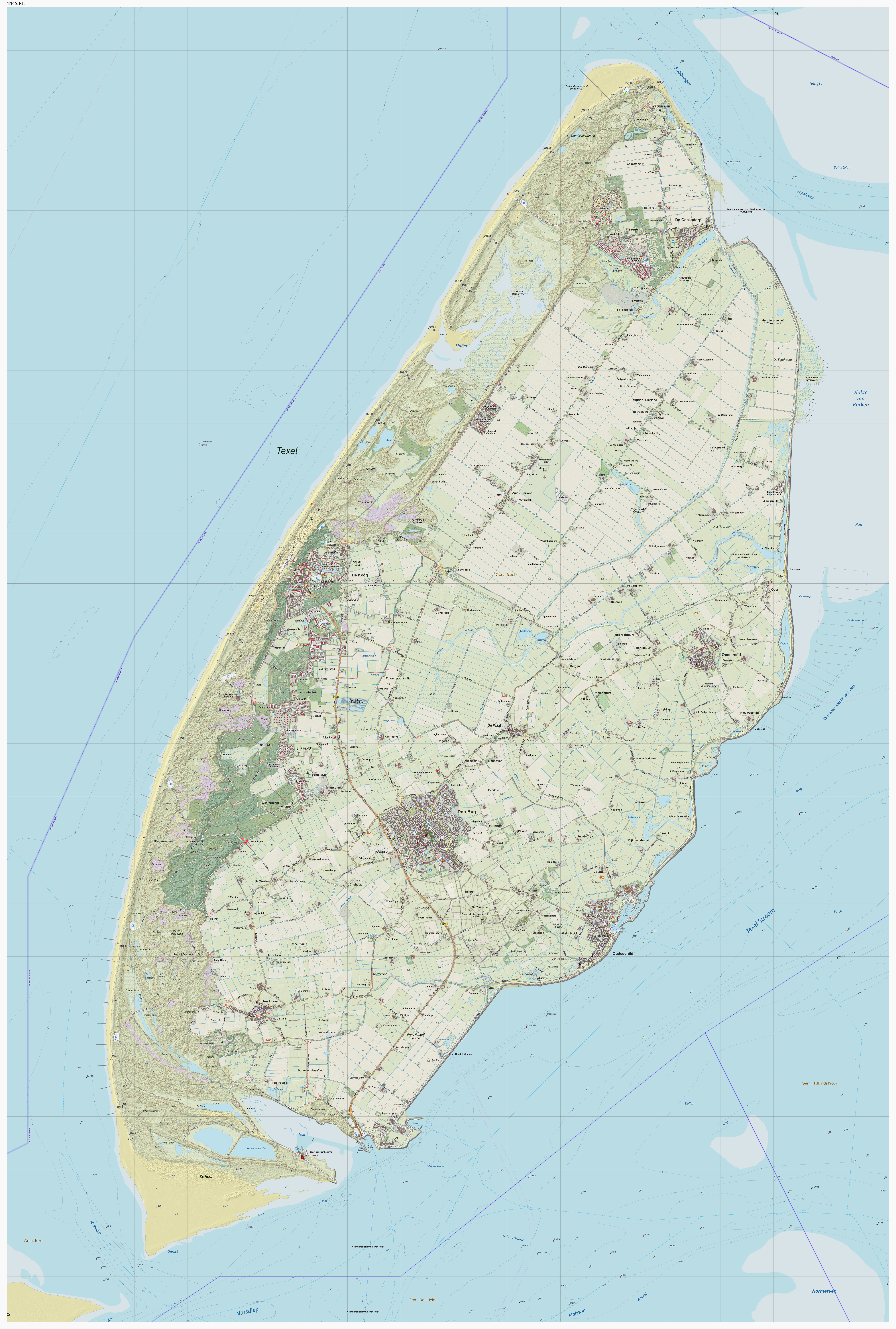 Topografische kaart van Texel. Resolutie: 400 pixels/km. Kaartbeeld samengesteld uit de open geodata van de Top10NL en Top25namen (Basisregistratie Topografie), Creative Commons BY licentie. Gebouwvlakken uit open geodata BAG extract. Wegen uit de OpenStreetMap, OpenStreetMap community. Reliëfschaduw uit de Actuele Hoogtekaart AHN2. Samenstelling en kleurenschema: Jan-Willem van Aalst, met QGIS2. Zie ook de Legenda.